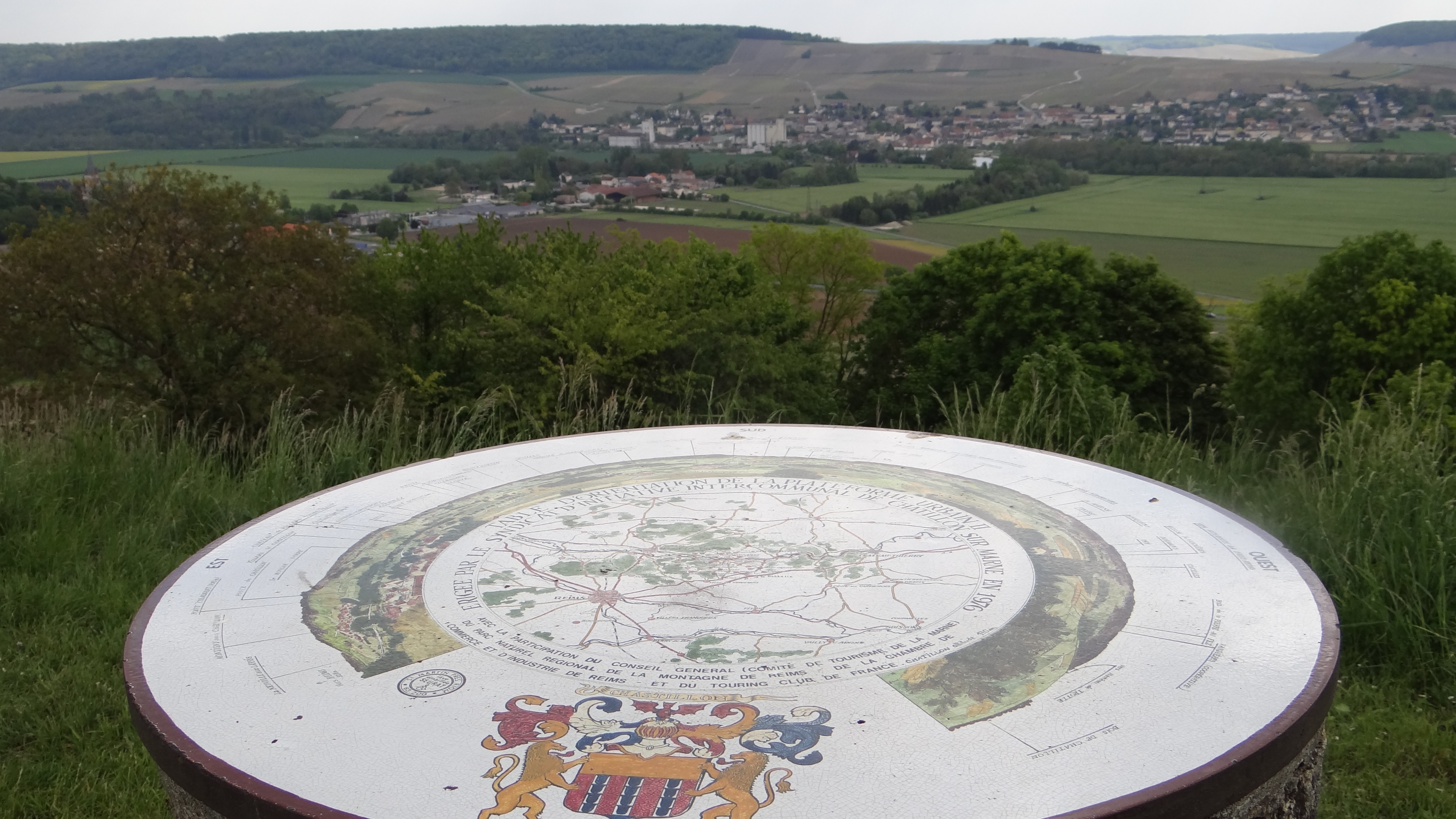 Châtillon-sur Marne, panorama et table d'orientation